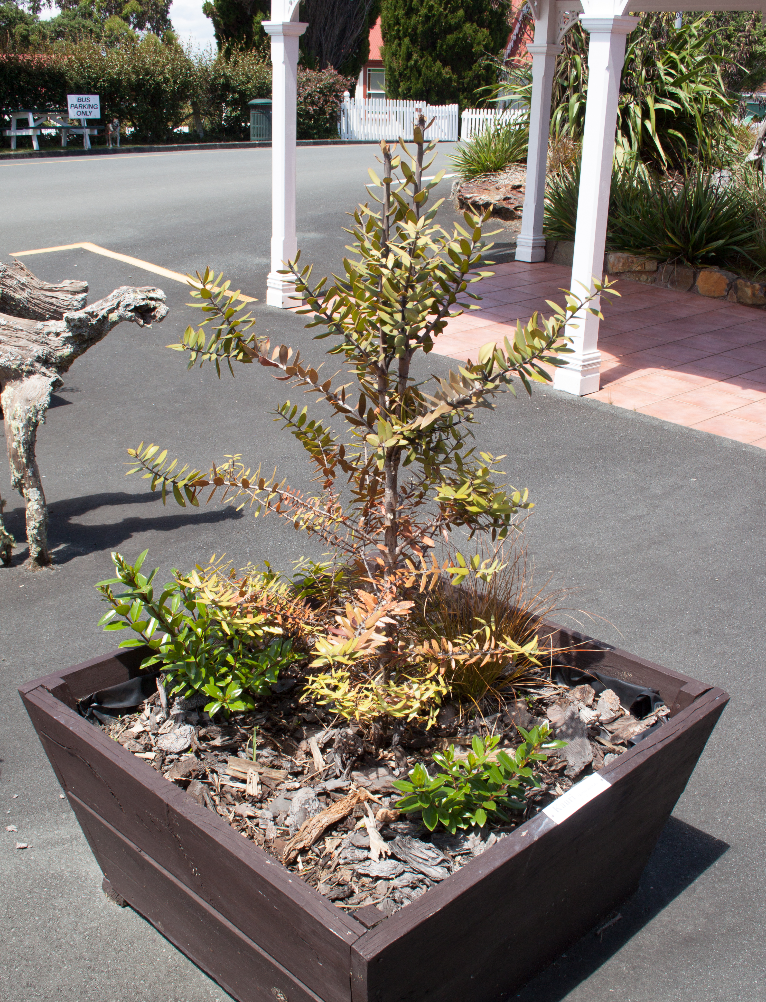 Matakohe, Kauri Museum, three year old kauri